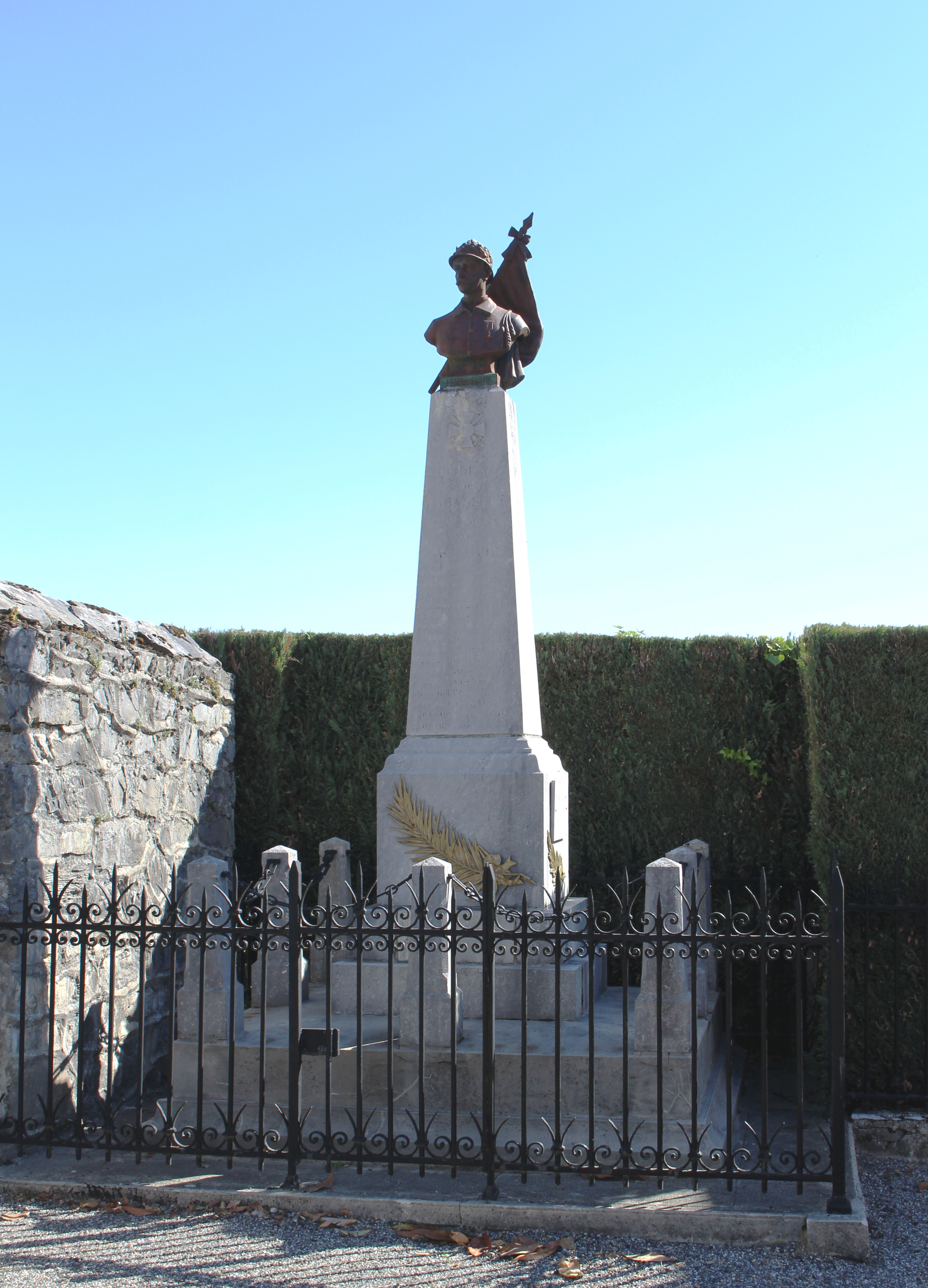 Monument aux morts de Labassère (Hautes-Pyrénées)